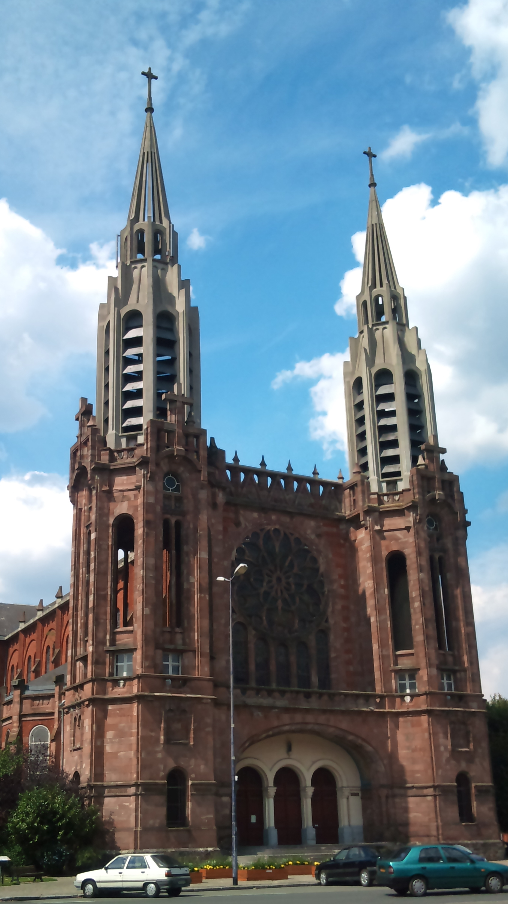 Armentières, place de la République : l'église Notre-Dame du Sacré-Cœur - architecte Gaston Trannoy (dossier LH 19800035/0113/14242).